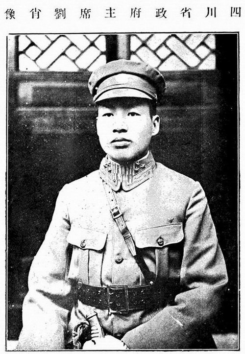 四川省政府主席劉文輝。